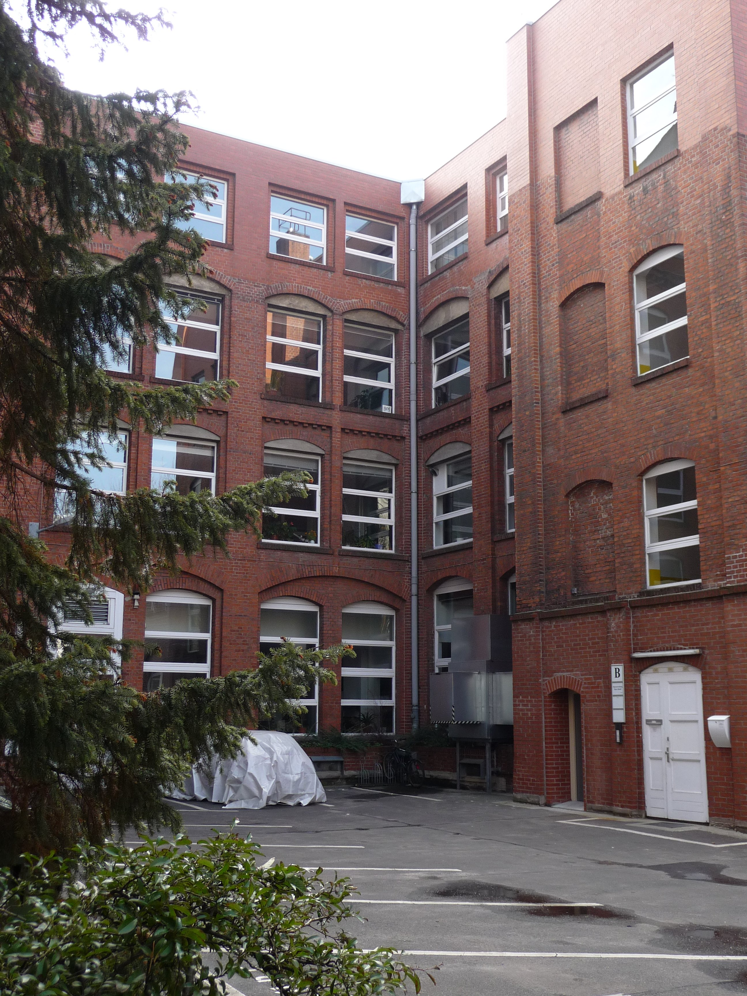 Hinterhof in Berlin-Kreuzberg, Nostitzstrasse 30; Kulisse für das „Fuhrunternehmen Franz Wagenseil“ in der deutschen Fernsehverfilmung „Ein Mann will nach oben“ von 1978